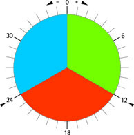 Kreisdiagramm Structogram